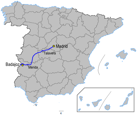 Mapa de la autovía A5